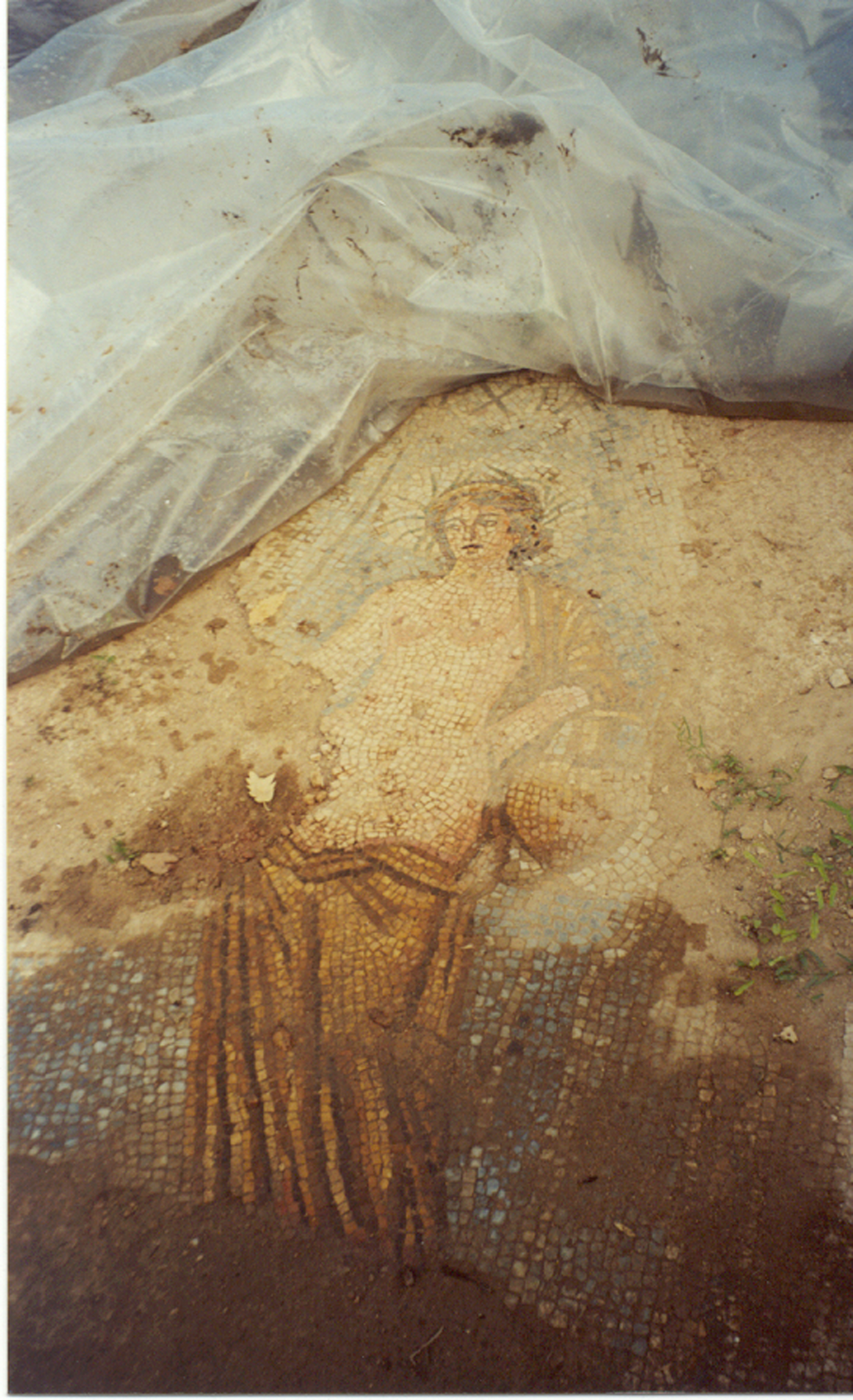 Photo by Antikgozlemci